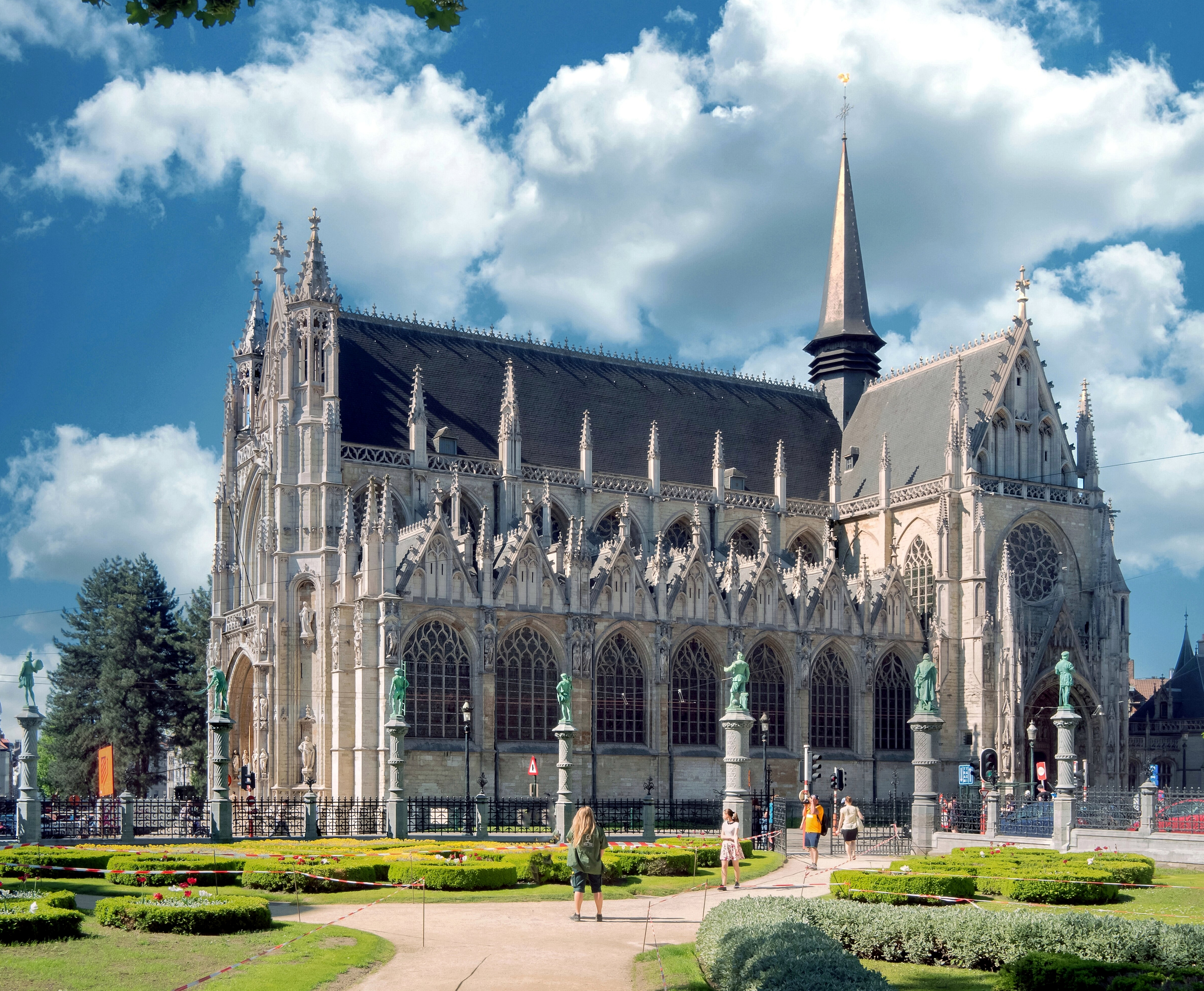 Brüssel, Kirche Notre-Dame du Sablon, Südwestseite.